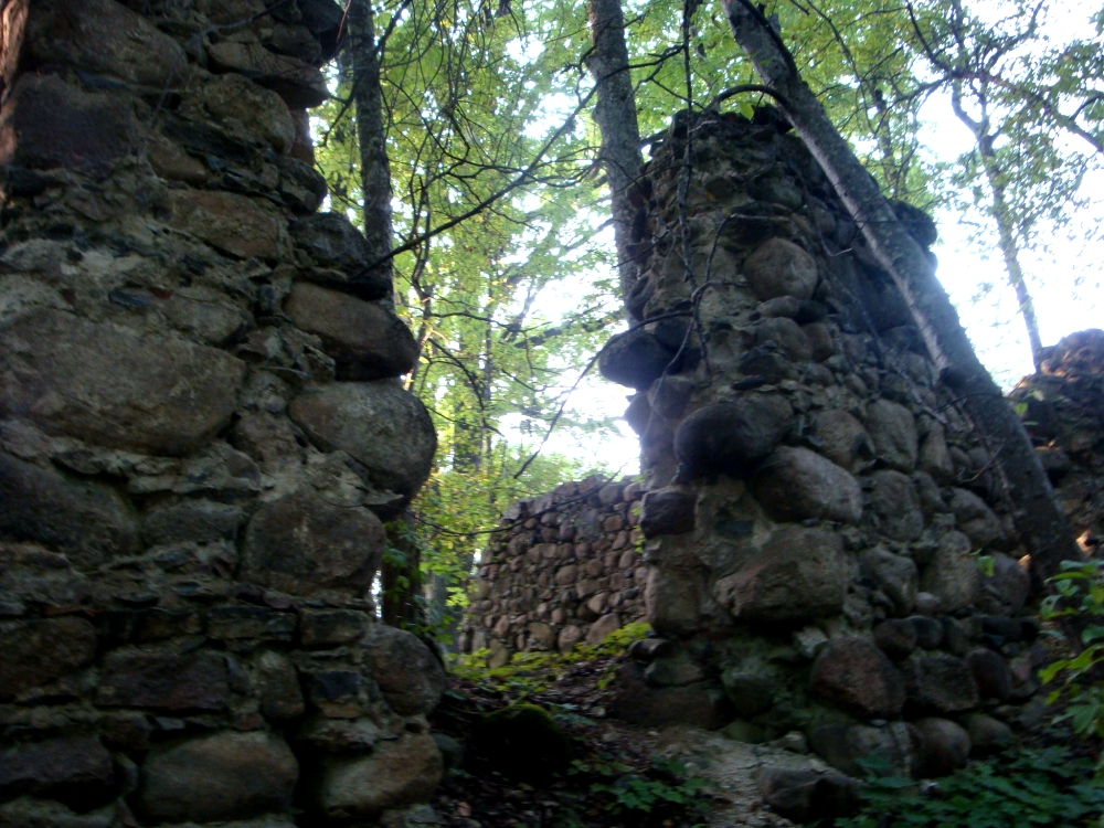 Skujeni ordulinnuse varemed.